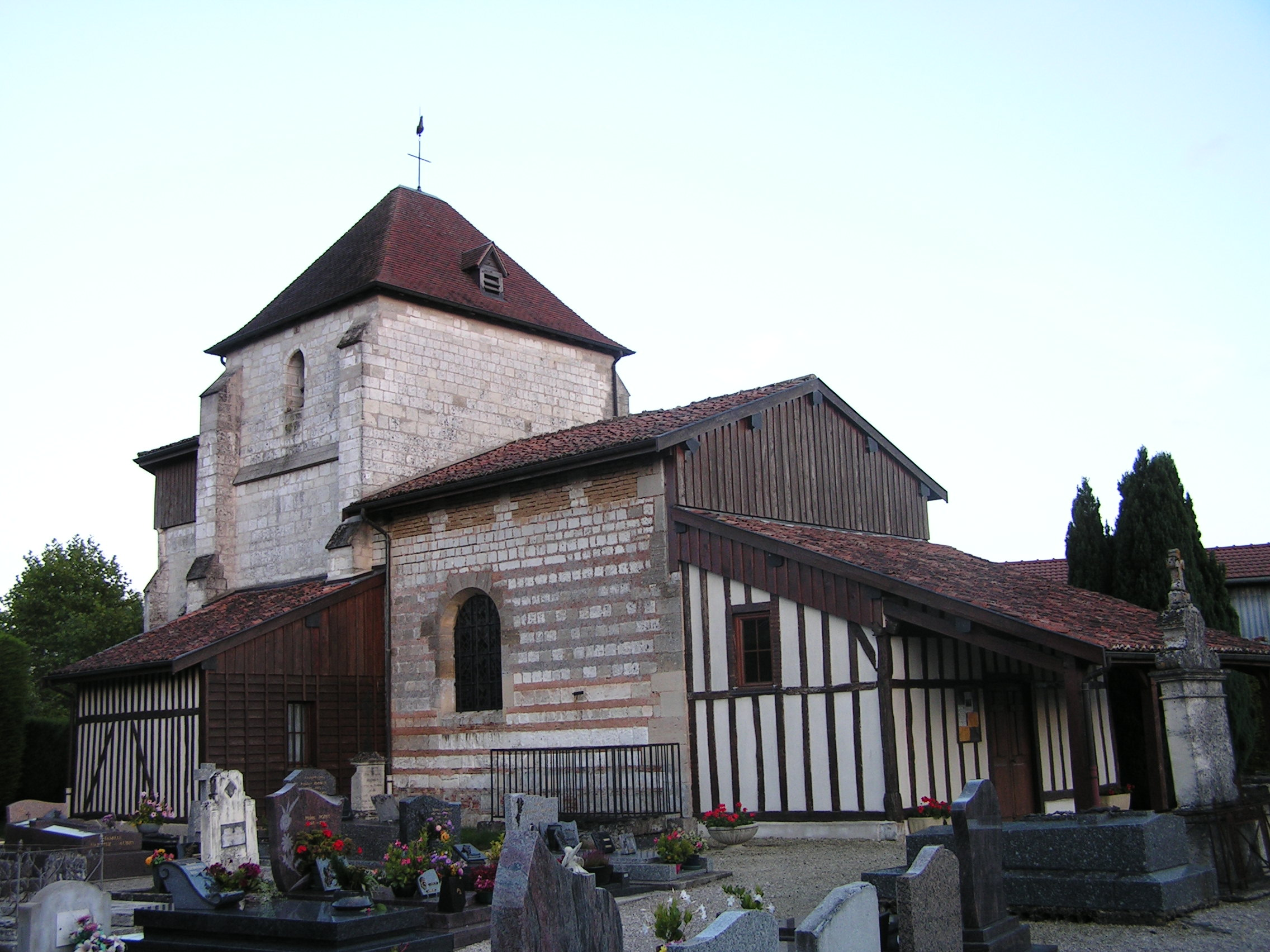 Église Saint-Martin de Norrois (Inscrit) .